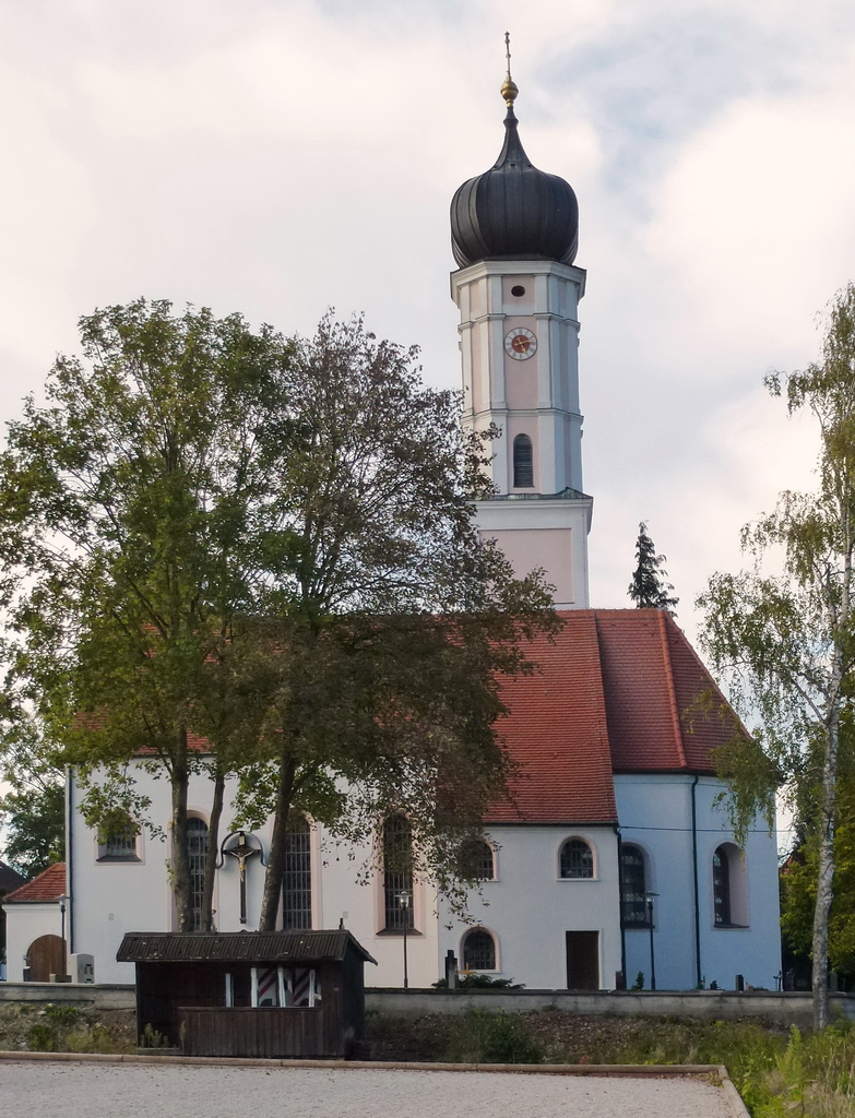 Alling-Holzhausen. Katholische Filialkirche Heilig Kreuz, Ansicht von SüdenThis is a photograph of an architectural monument.